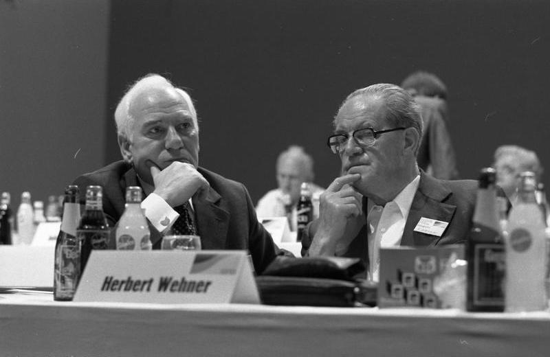 Außerordentlicher Parteitag der SPD in der Westfalenhalle Dortmund